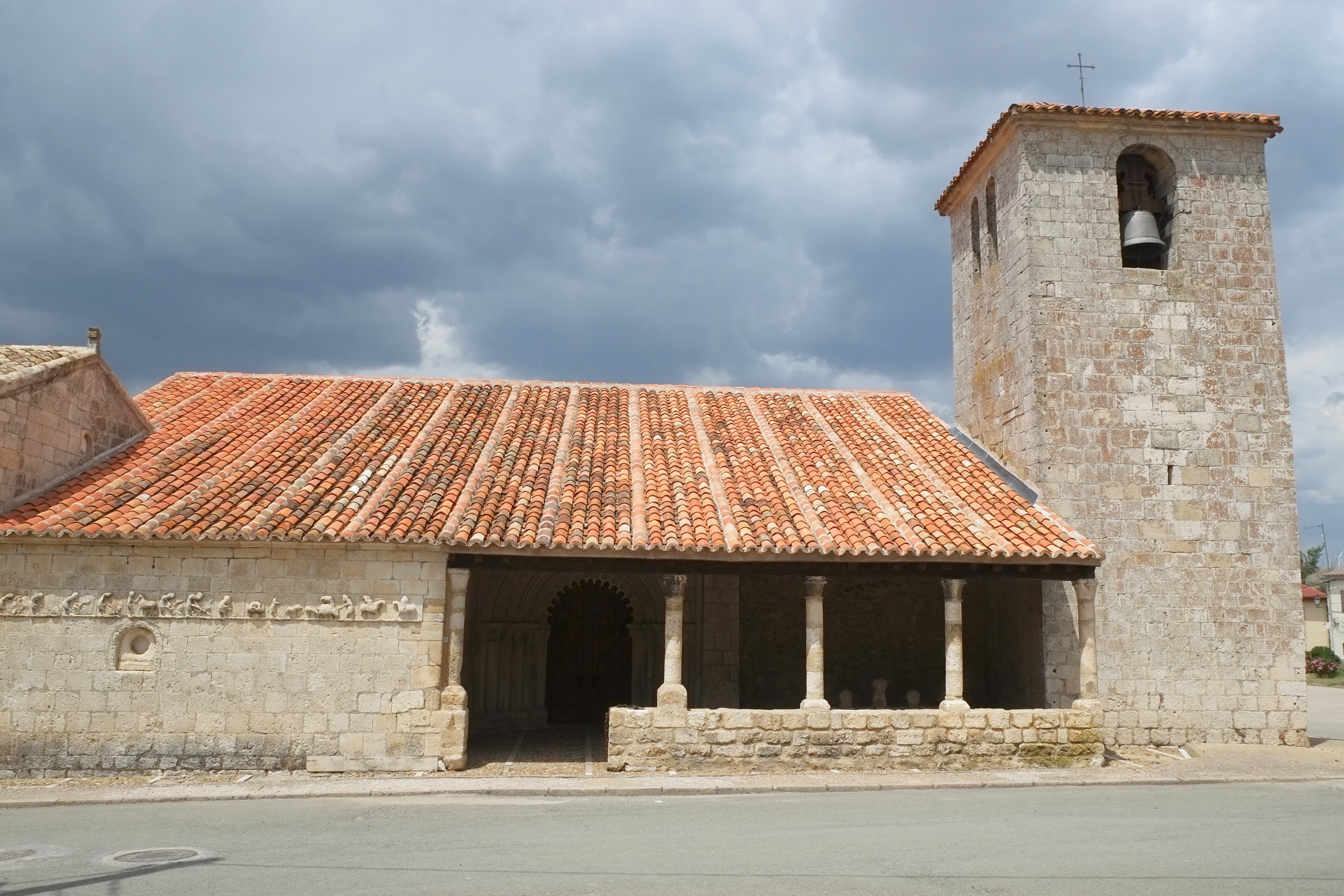 Kirche San Bartolomé in Campisábalos in der Provinz Guadalajara in Spanien